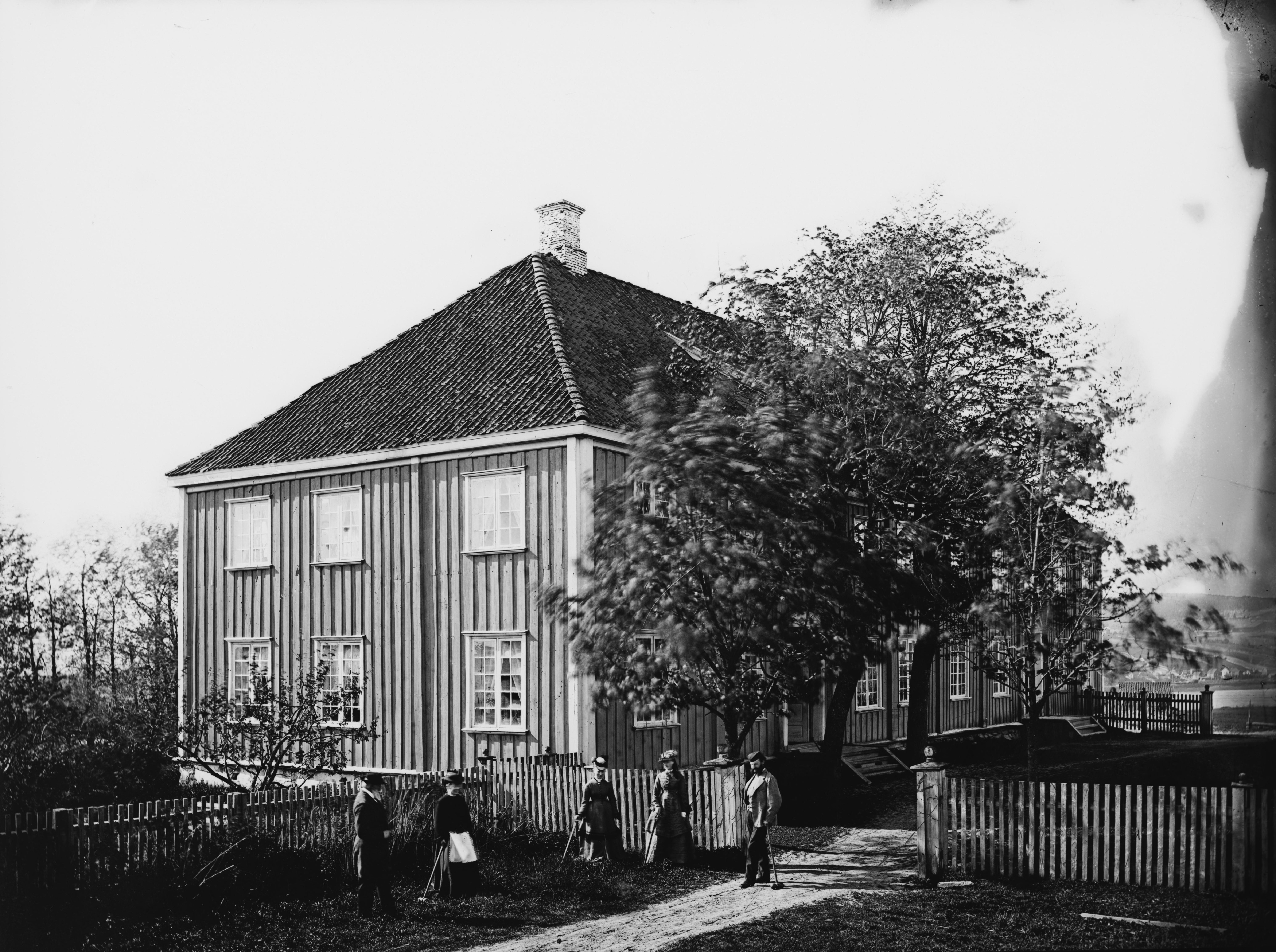 Sted: Fetsund Kommune: Fet Fylke: Akershus Tagger: Tvilsom. Fet gamle pestegård fra ca 1760 ble revet og erstattet med dagens 1,5 etasjes hus i sveiserstil i 1901.